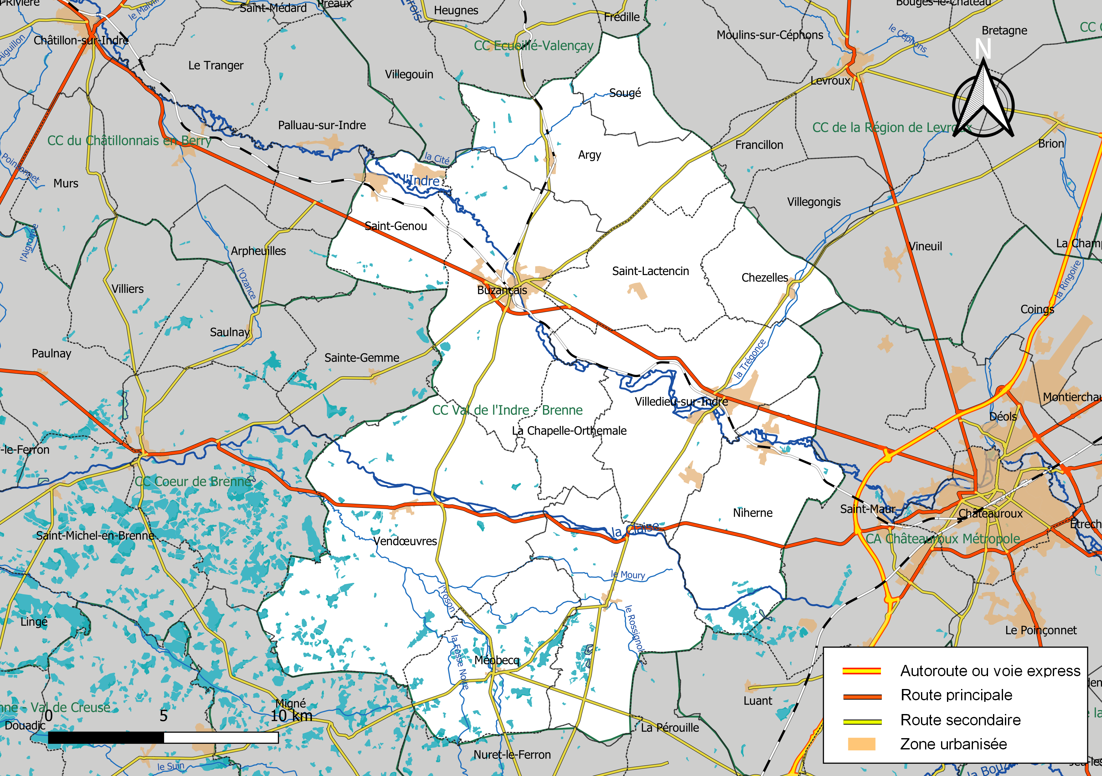 Carte de la communauté de communes Val de l'Indre - Brenne, département de l'Indre, France. Composition au 1er janvier 2019.